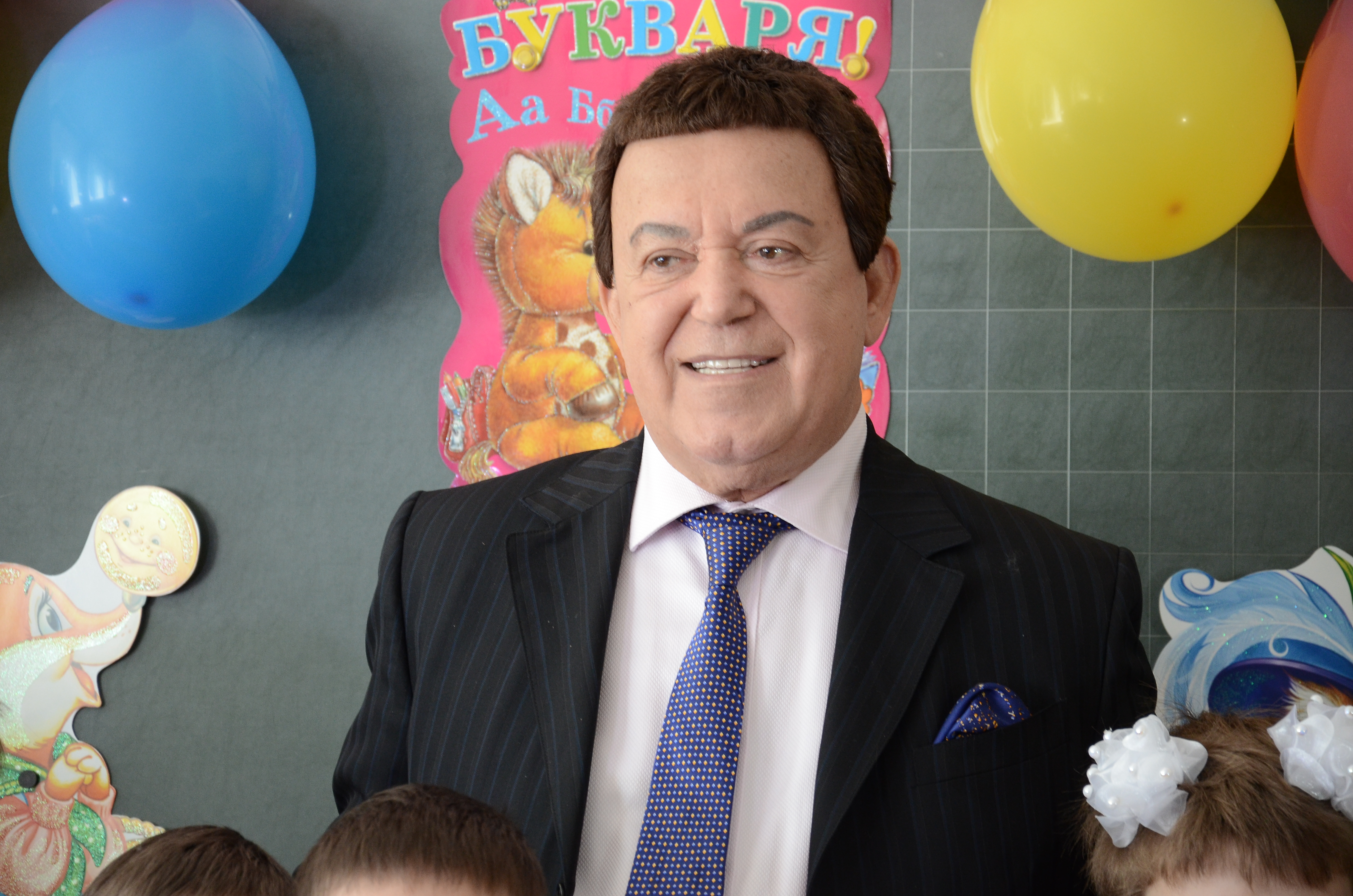 Последний звонок в 47 школе Донецка.